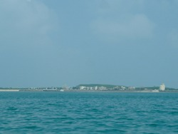 中文（台灣）: 遠眺大倉嶼。